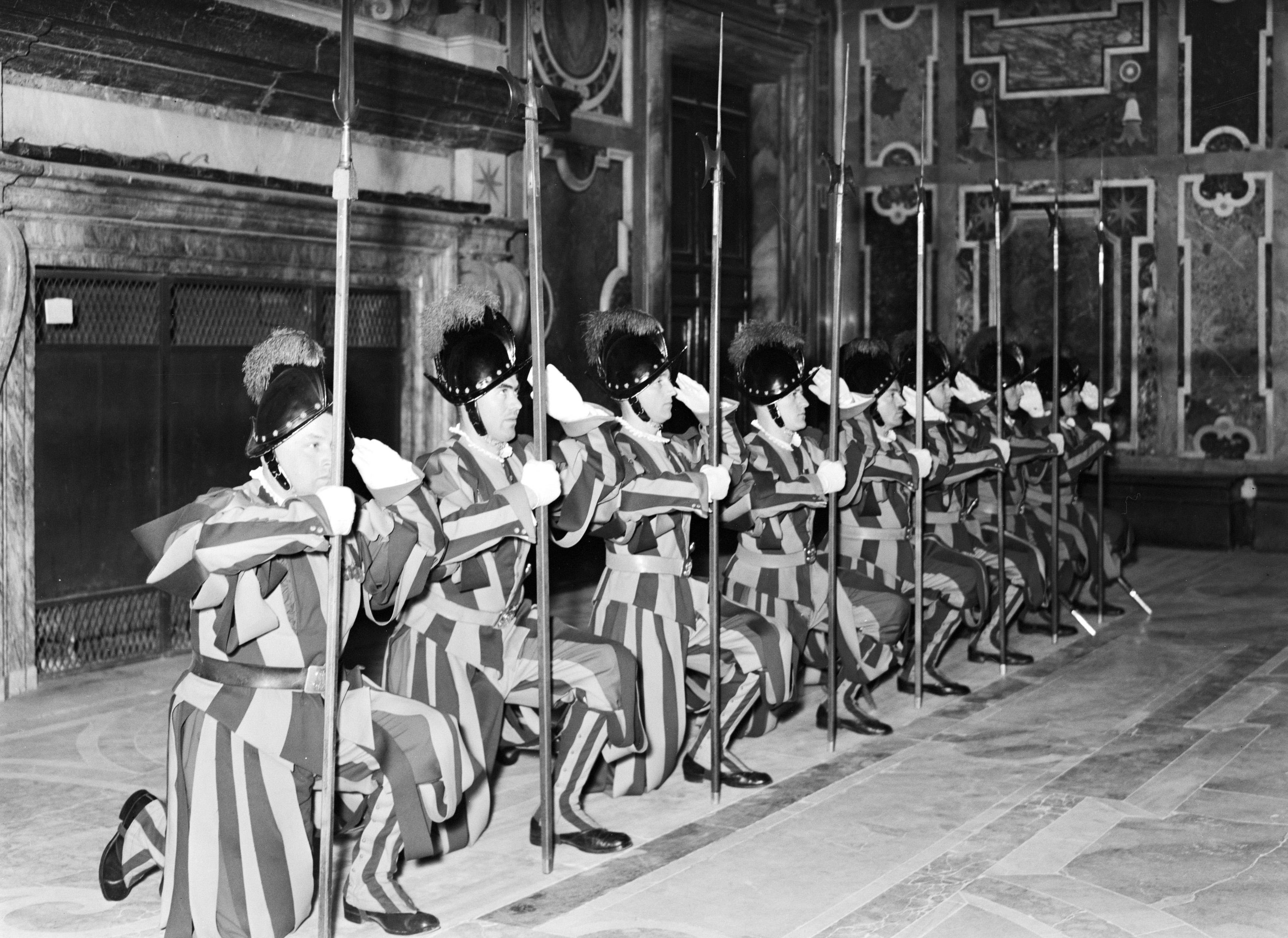 Collectie / Archief : Fotocollectie Van de Poll Reportage / Serie : Rome: De Pauselijke Zwitserse Garde in Vaticaanstad Beschrijving : Knielend saluut van de wacht in de Sala Clementina één van de audiëntiezalen op de 2e verdieping van het Apostolisch Paleis Datum : december 1937 Locatie : Italië, Rome, Vaticaanstad Trefwoorden : hoofddeksels, militairen, muurschilderingen, paleizen, uniformen, wapeninspecties, wapens Instellingsnaam : Vaticaan Fotograaf : Poll, Willem van de, [onbekend] Auteursrechthebbende : Nationaal Archief Materiaalsoort : Glasnegatief Nummer archiefinventaris : bekijk toegang 2.24.14.02 Bestanddeelnummer : 191-1308